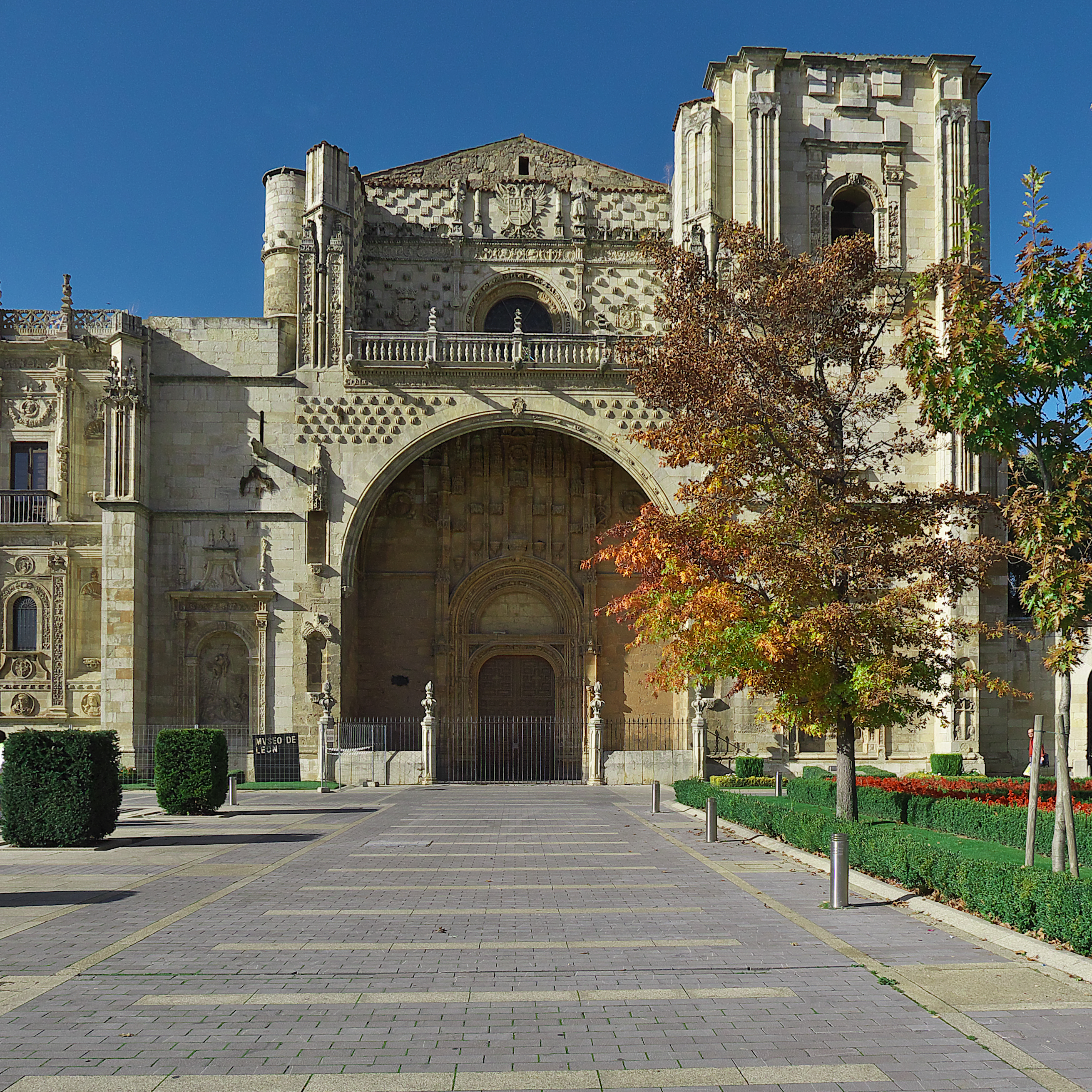 Portada de los pies de la iglesia conventual (1531-1541), situada en el hastial meridional. Iglesia iniciada por Juan de Horozco y terminada por Juan de Álava y Martín Villareal. Presenta inacabada la torre-campanario y añade elementos renacentistas, recordándonos al Convento de San Esteban (Salamanca)